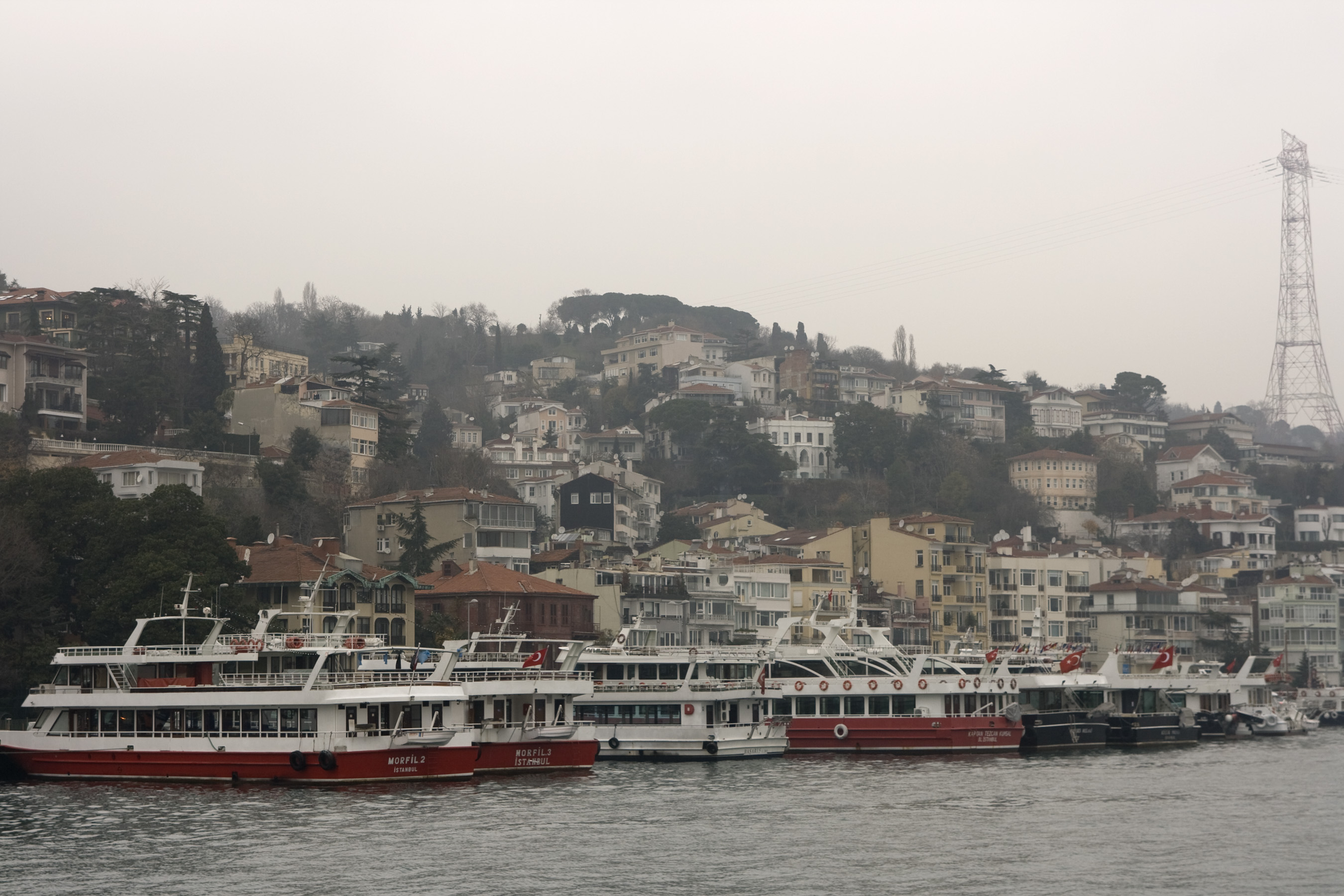 Kuruçeşme, Kuruçeşme Cd., 34345 Beşiktaş/İstanbul, Turkey